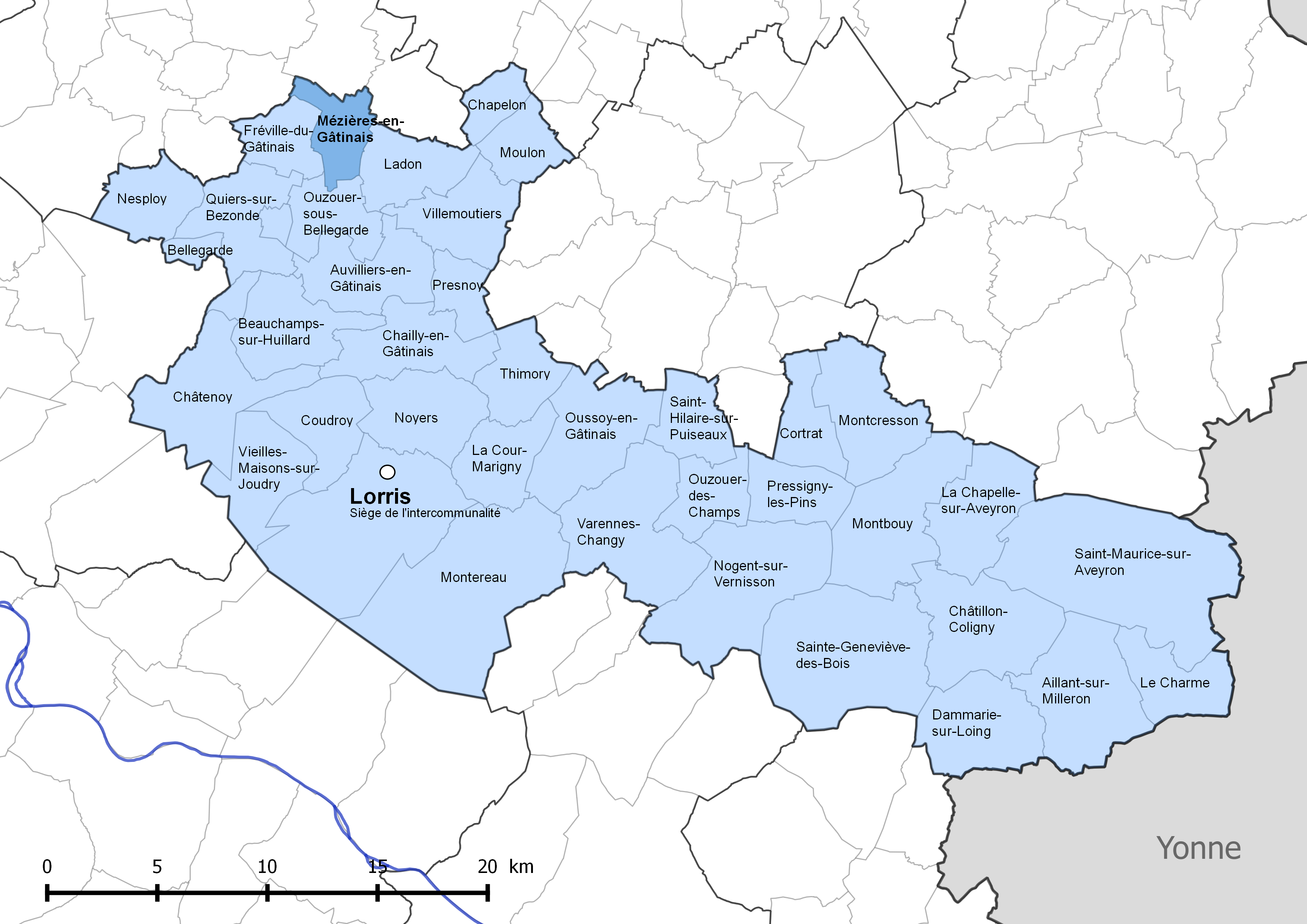 Périmètre de la communauté de communes Canaux et forêts en Gâtinais - Situation de la commune de Mézières-en-Gâtinais.